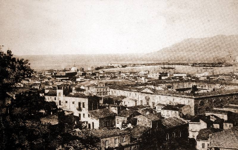 Foto, anteriore al Terremoto di Messina del 1908, dell'Ospedale Maggiore di Messina, opera di Andrea Calamech.